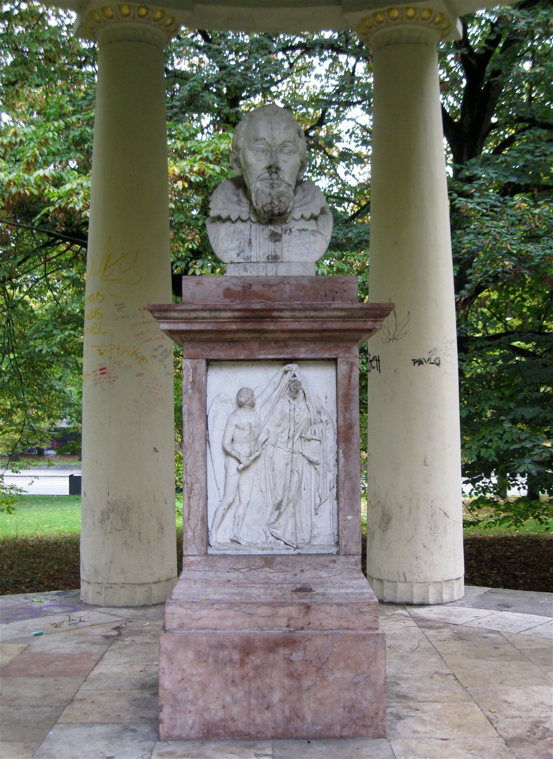 Fürst-Anselm-Allee; Denkmal für Johannes Kepler, dorischer Monopteros mit Kegeldach, Büste, Marmorrelief (Kopien, Originale im Hist. Museum) und astronomischen Symbolen, 1806/1808 von Emanuel d`Herigoyen, Büste von Friedrich Döll, Marmorrelief von Johann Heinrich von Dannecker; bis 1859 weiter westlich stehend.